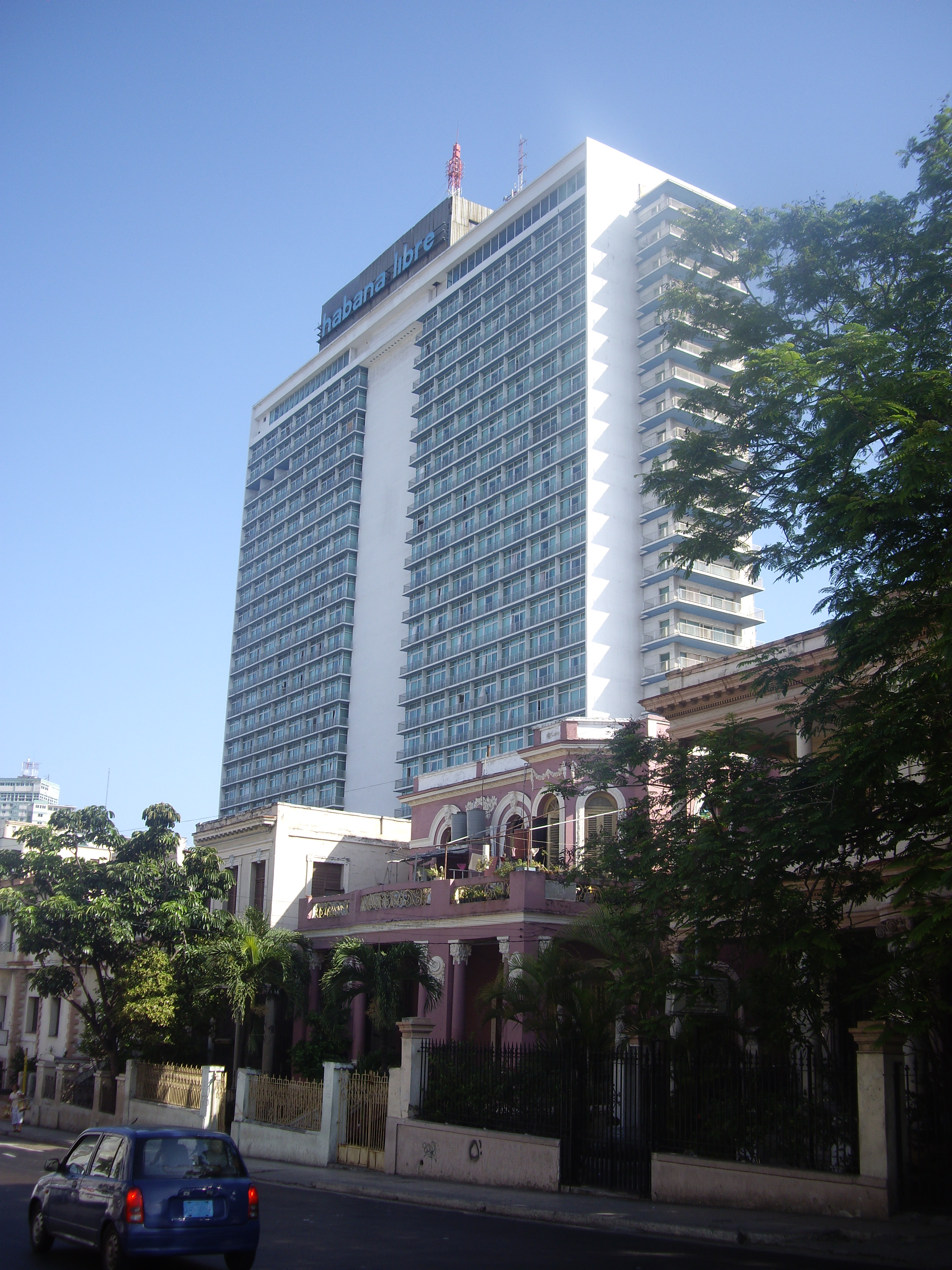 Hotel Habana Libre (l'Havana)